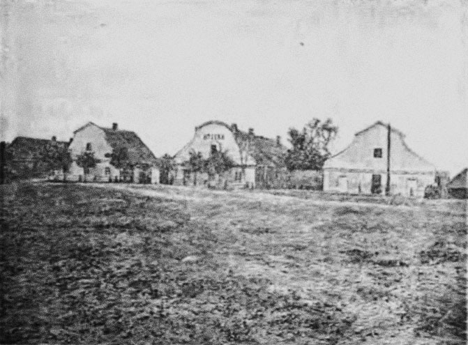 Беларуская (тарашкевіца): Паставы (Pastavy), пляц Стары Рынак (plac Stary Rynak)